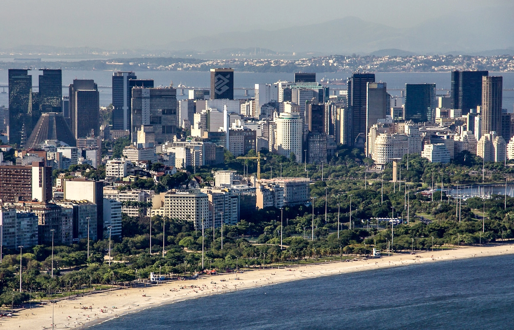 Urca, Rio de Janeiro - State of Rio de Janeiro, Brazil